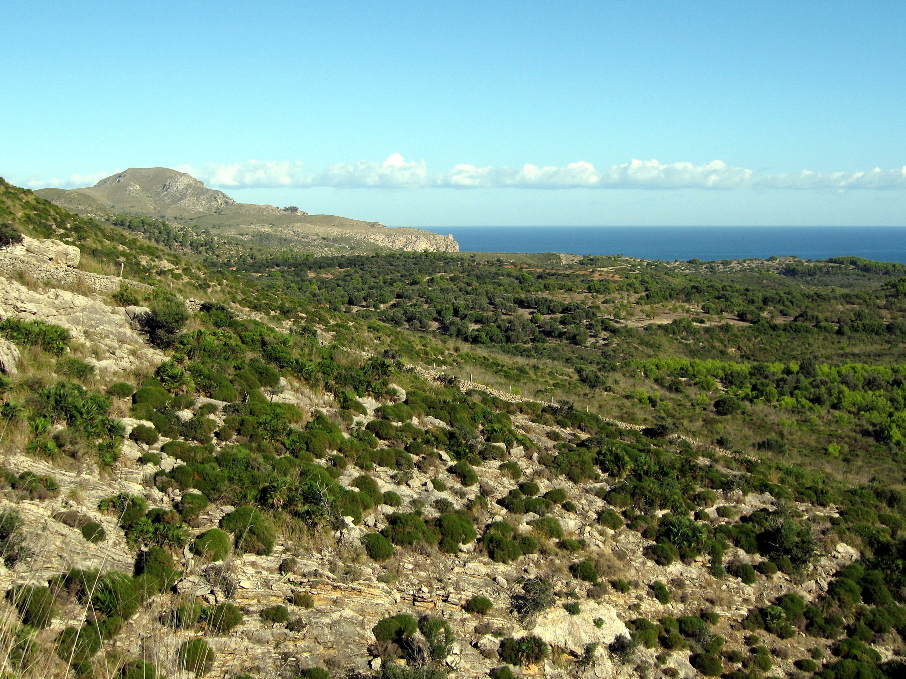 Blick über das Landgut Aubarca (Albarca) auf den 432 Meter hohen Berg Talaia Moreia am Cap de Ferrutx an der Nordostküste von Mallorca, Spanien